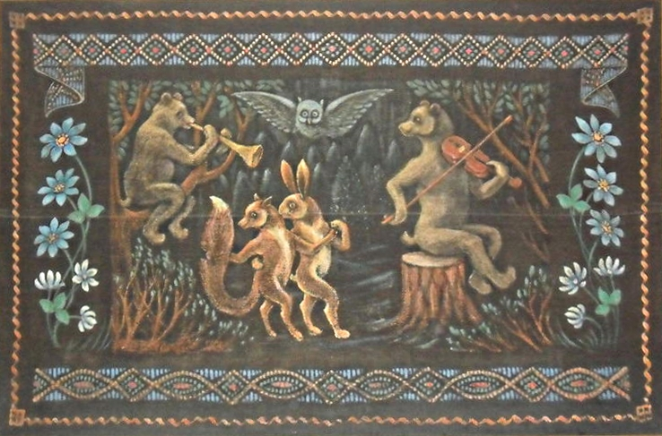 Ковёр-маляванка «Музыкі» кисти Язэпа Дроздовича из коллекции Германовичского музея культуры и быта